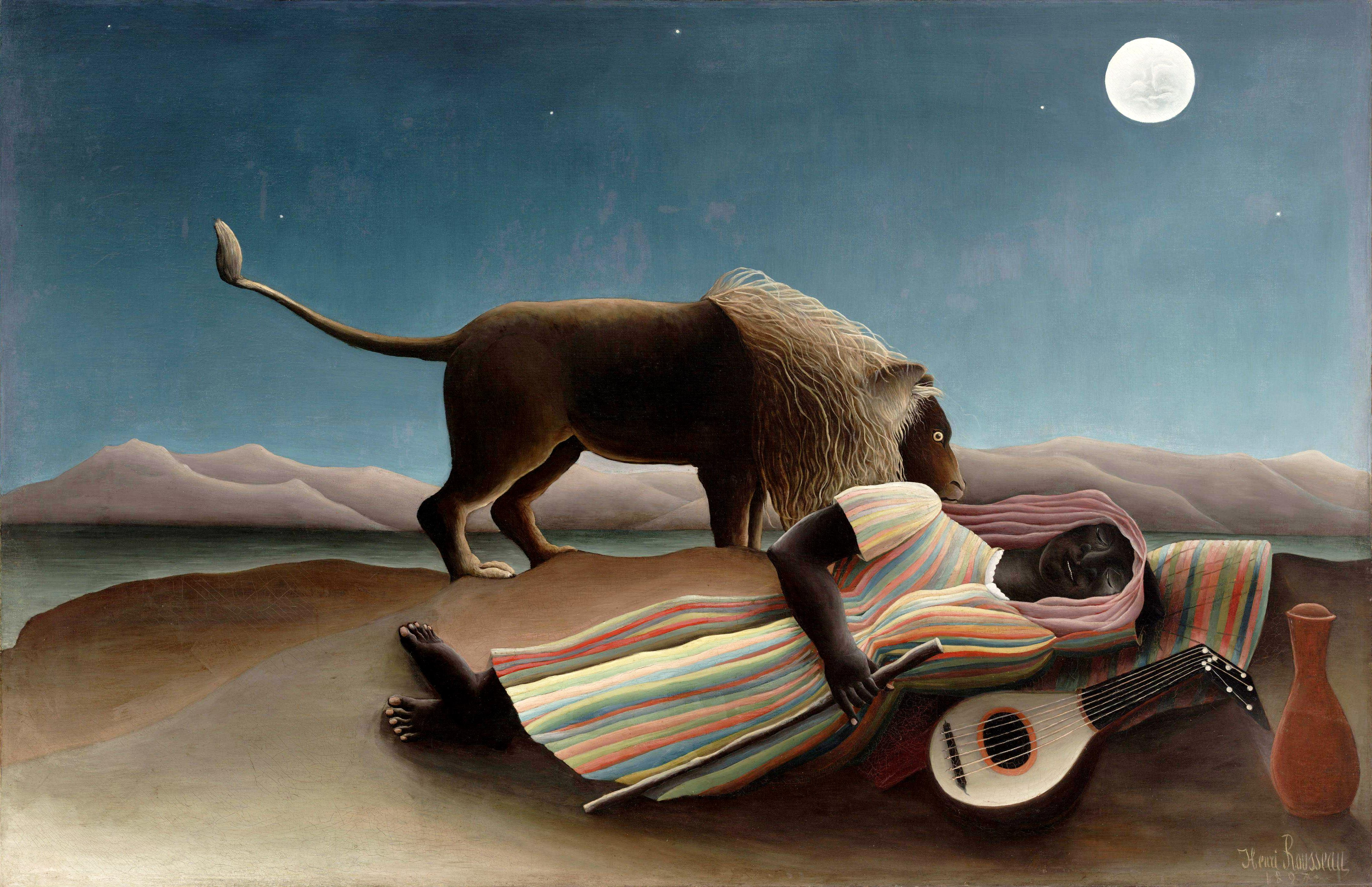 Henri Rousseau - La zingara addormentata